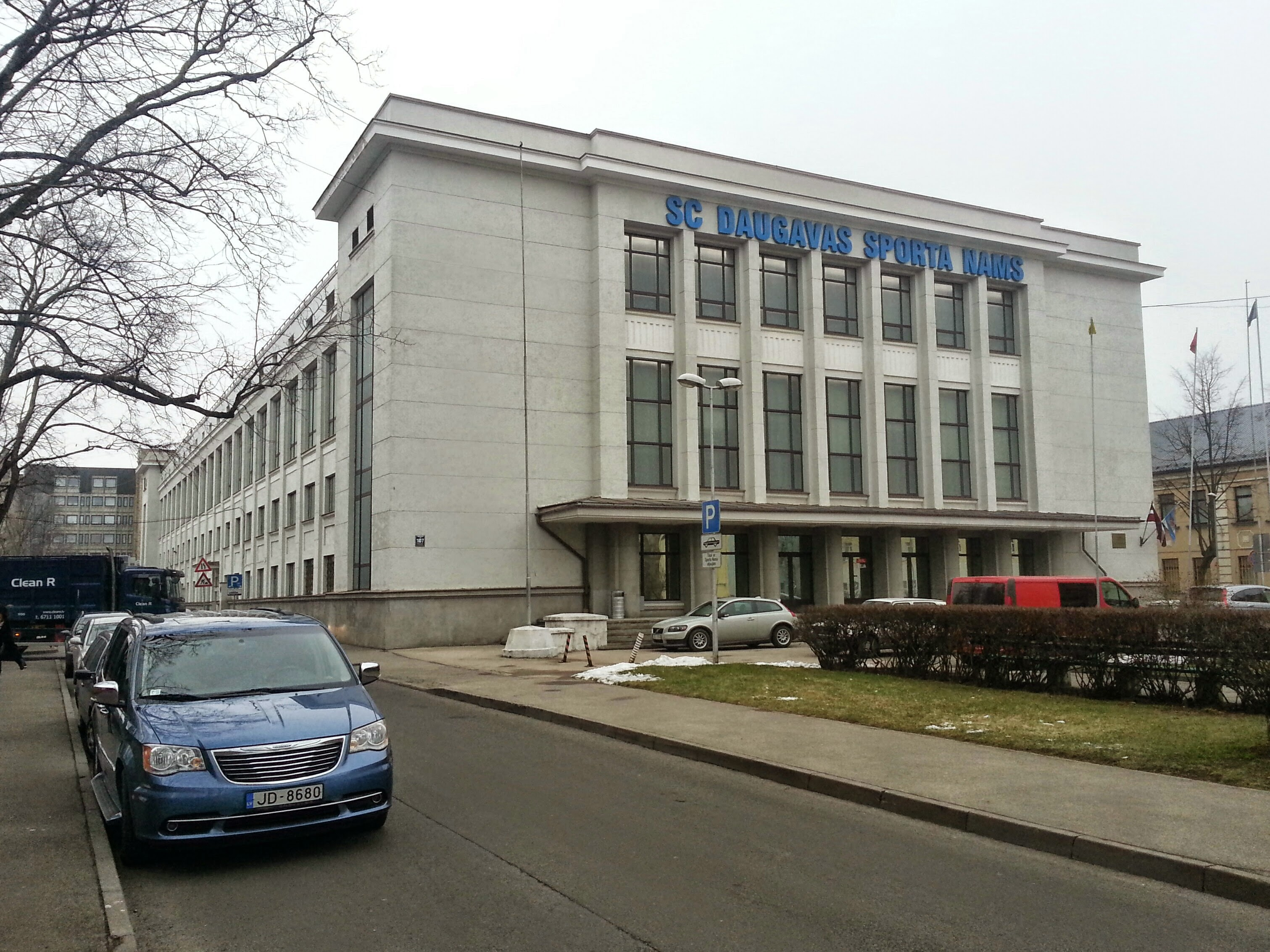 Sporta nams "Daugava". Sporta namu "Daugava" atklāja divos etapos: 1963. gada beigās atklāja baseinu, bet 1964. gada sākumā - zāli sporta spēlēm.